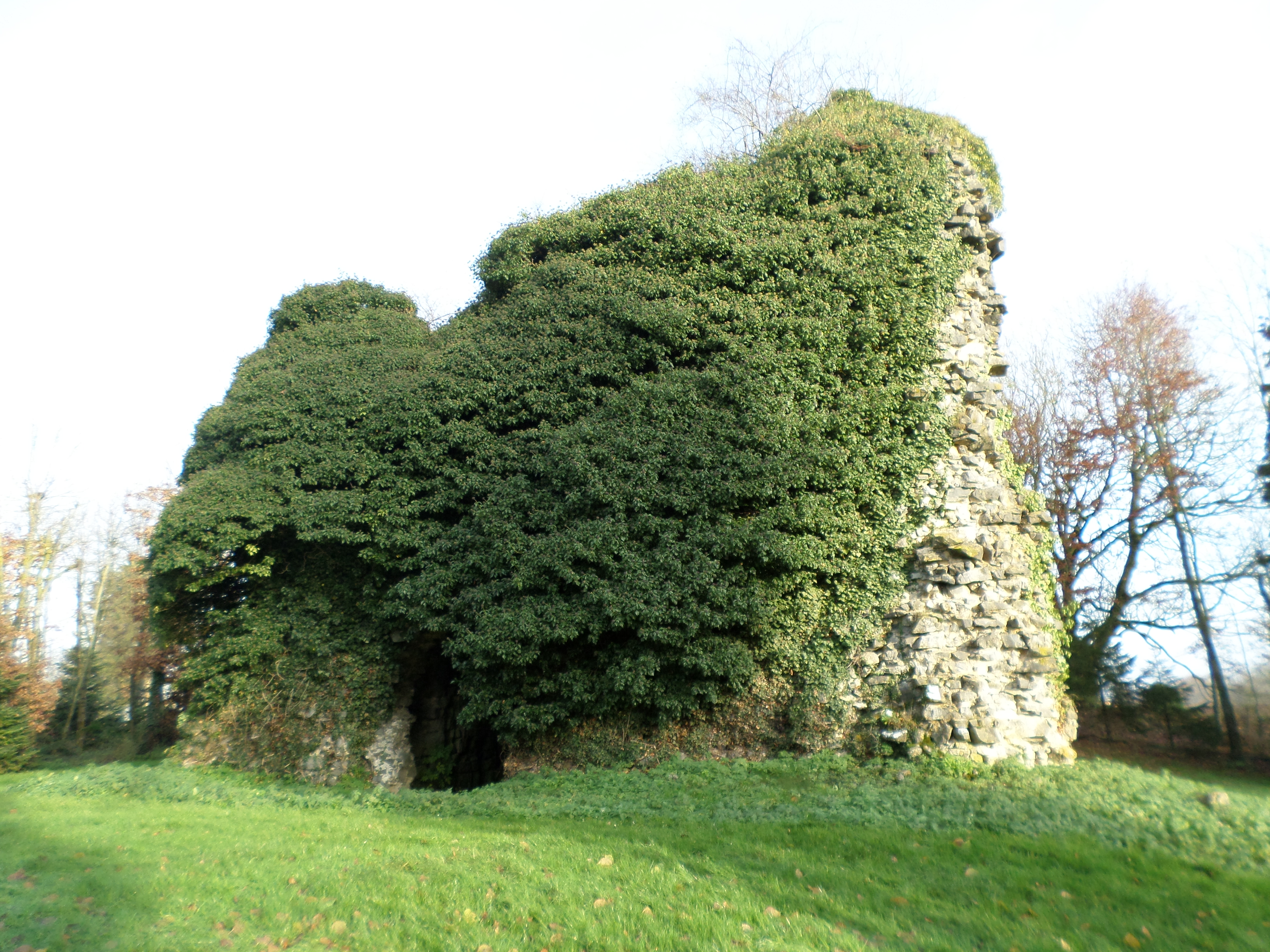 Tour féodale dite "Sarrasine". Beaufort (Nord)